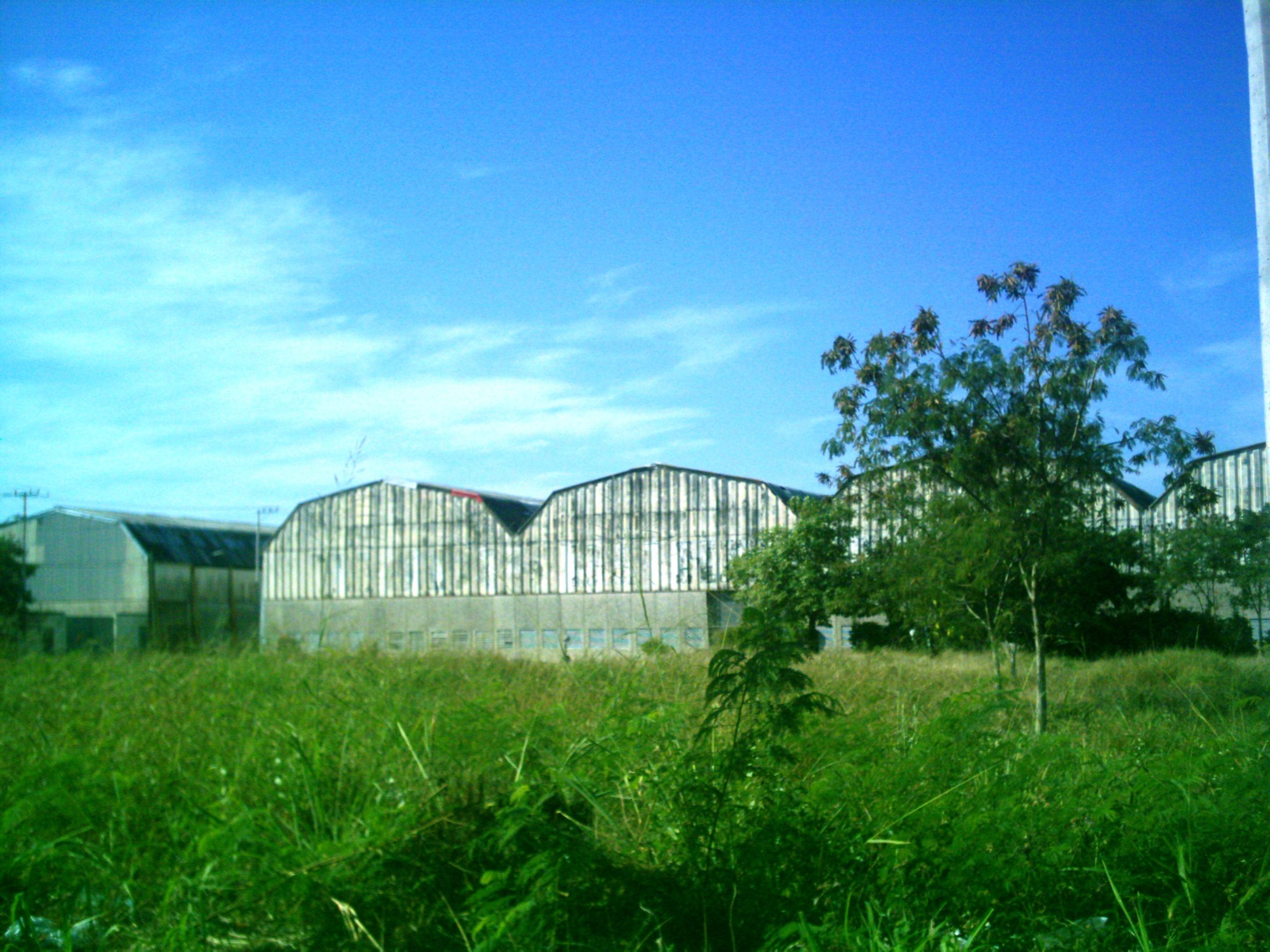 Antiguas instalaciones de Cordemex.